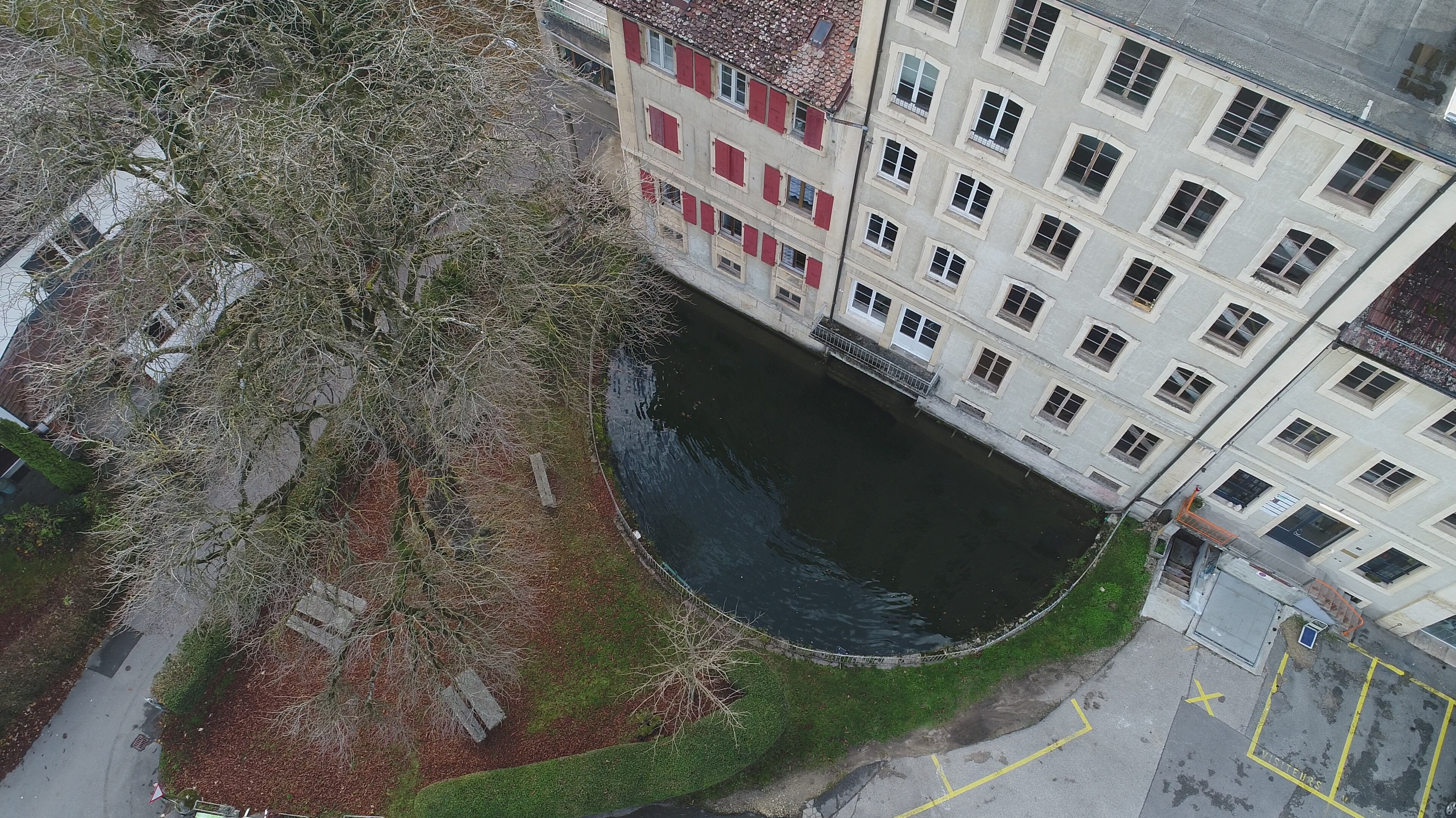 Milieu du monde, moulin Bornu , rencontre de rivières qui vont partir au Nord dans le Rhin, et au Sud dans le Rhone !